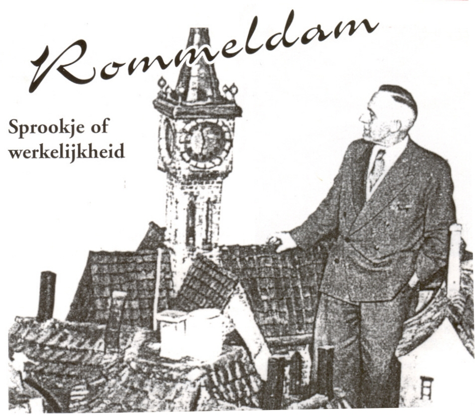 Gielissen werkplaats Zoutstraat Eindhoven 1955 voorbereiding Rommeldam miniatuurstad Oisterwijk Ollie B Bommel TomPoes